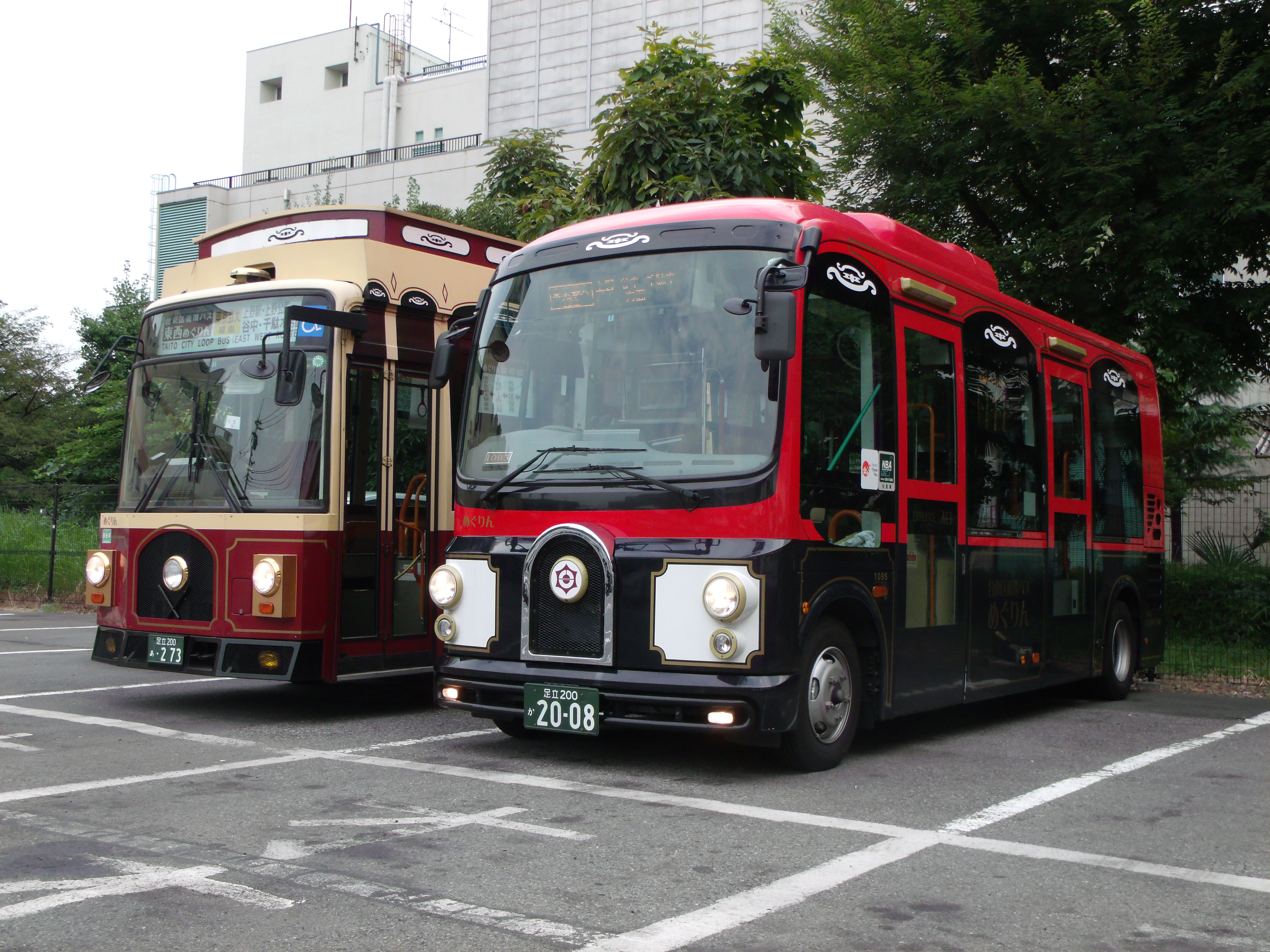 東西めぐりん専用車とみんなのめぐりん共用車